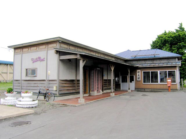 駅舎。手前の建物は町が建てた公衆トイレである。 撮影場所 増毛駅駅前広場より。 撮影者によるGFDLリリース